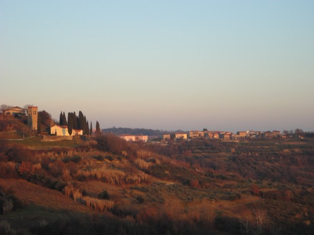 Panorama Crassiza